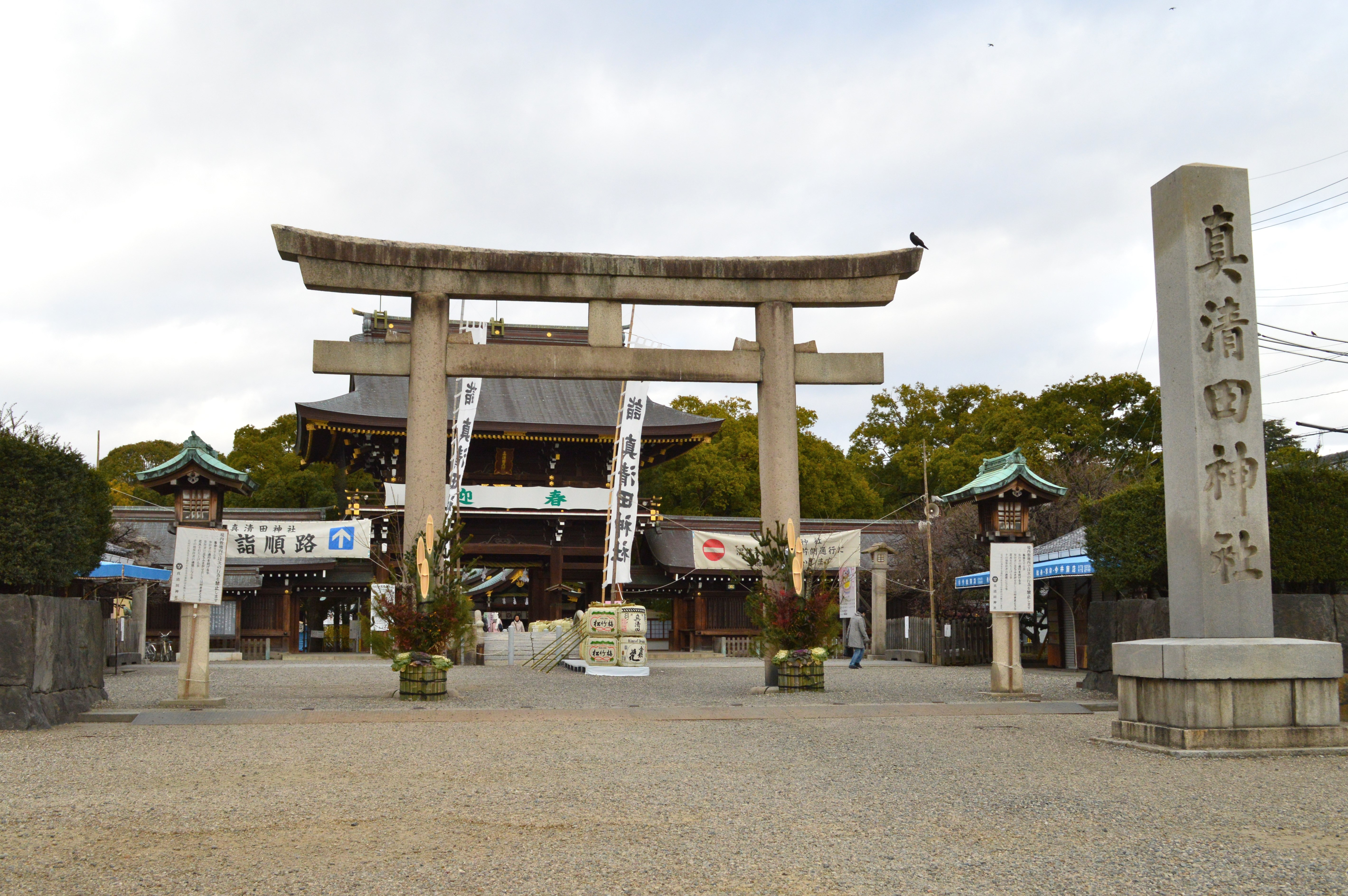 真清田神社 鳥居